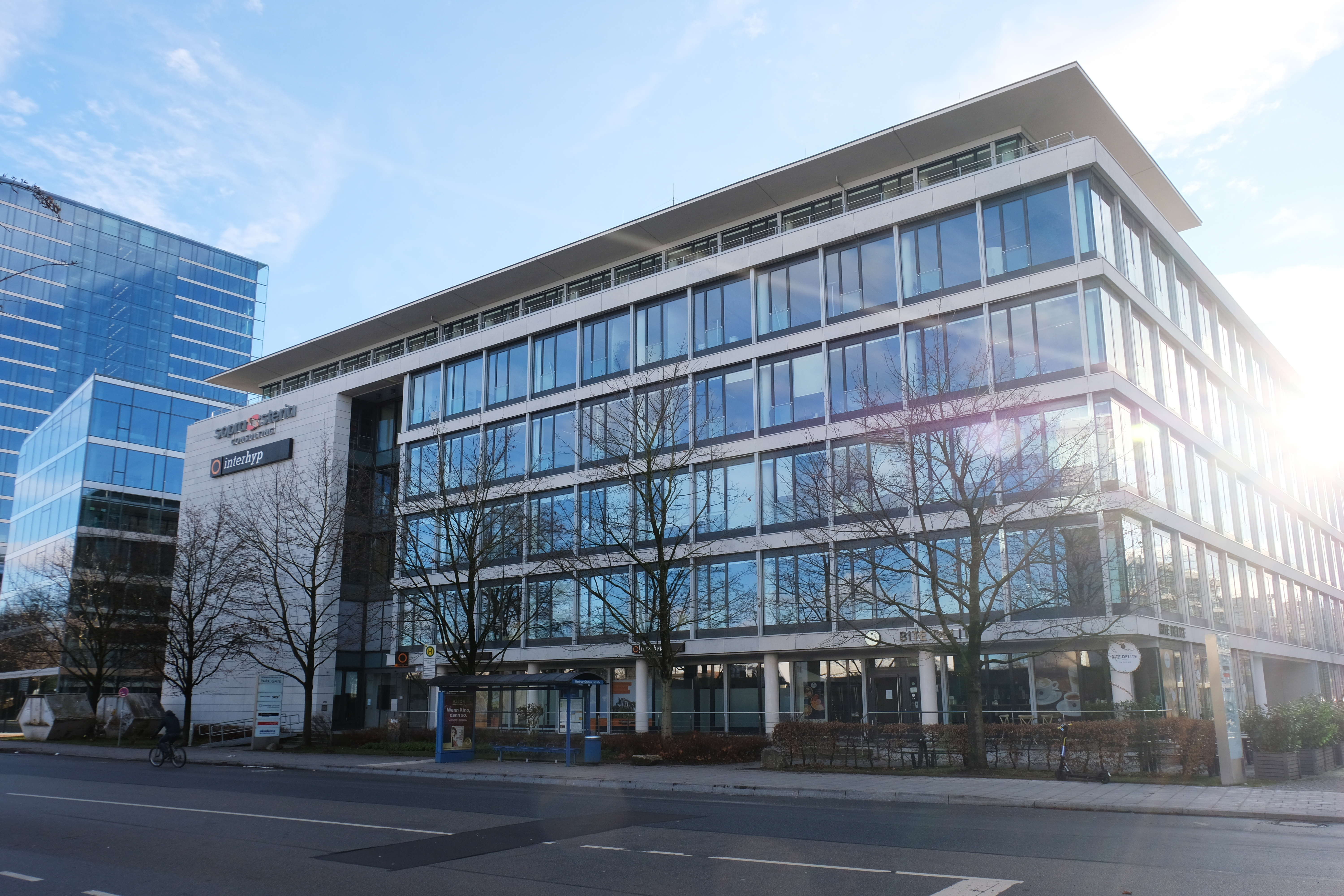 Die Domagkstraße 34 in München (2019)